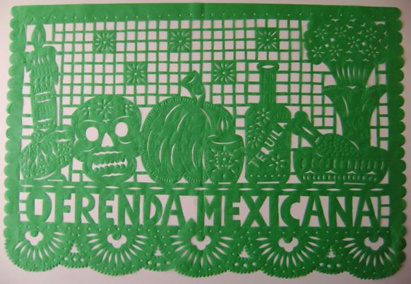 ejemplo de papel picado